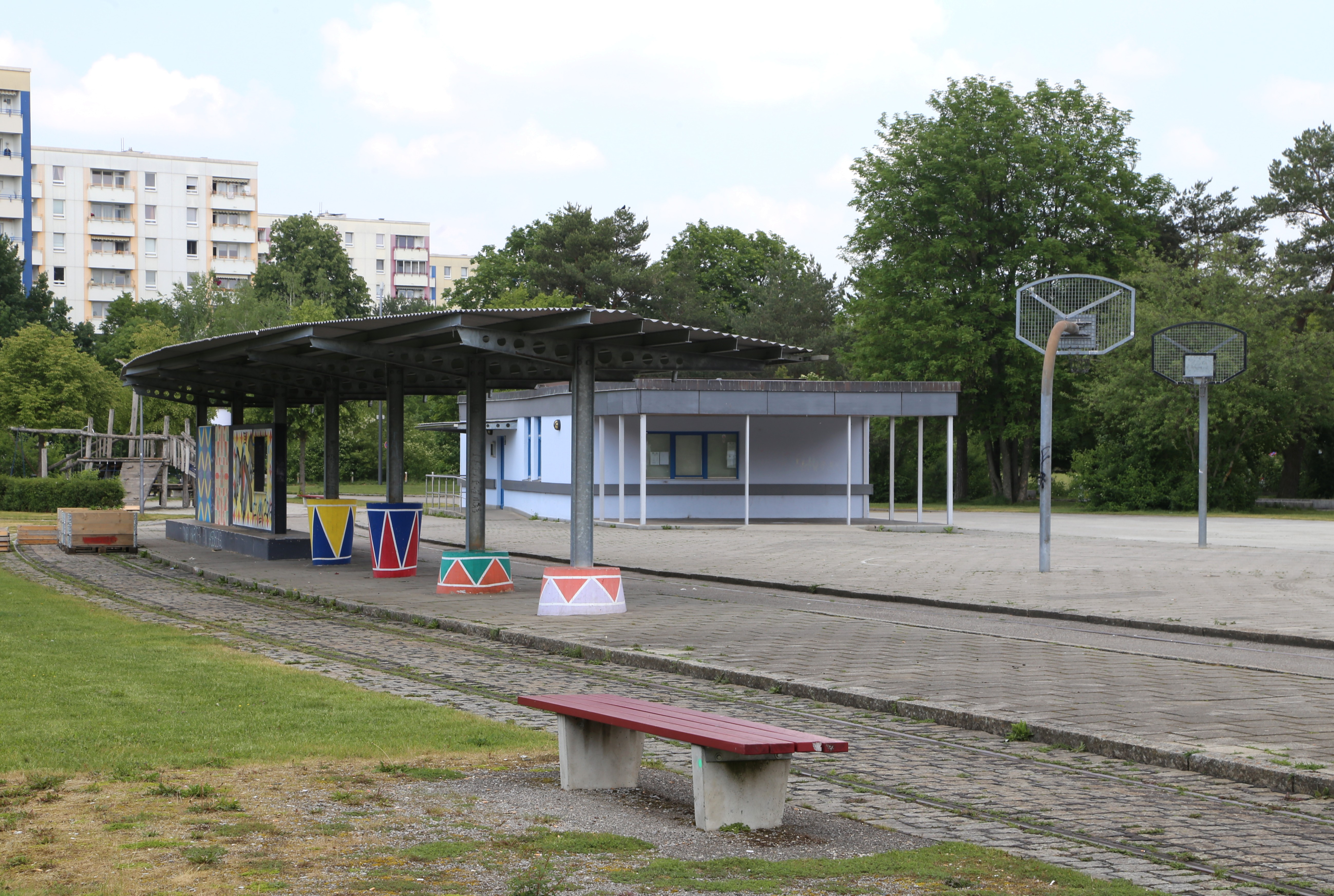 Goldschmiedplatz, Hasenbergl, München